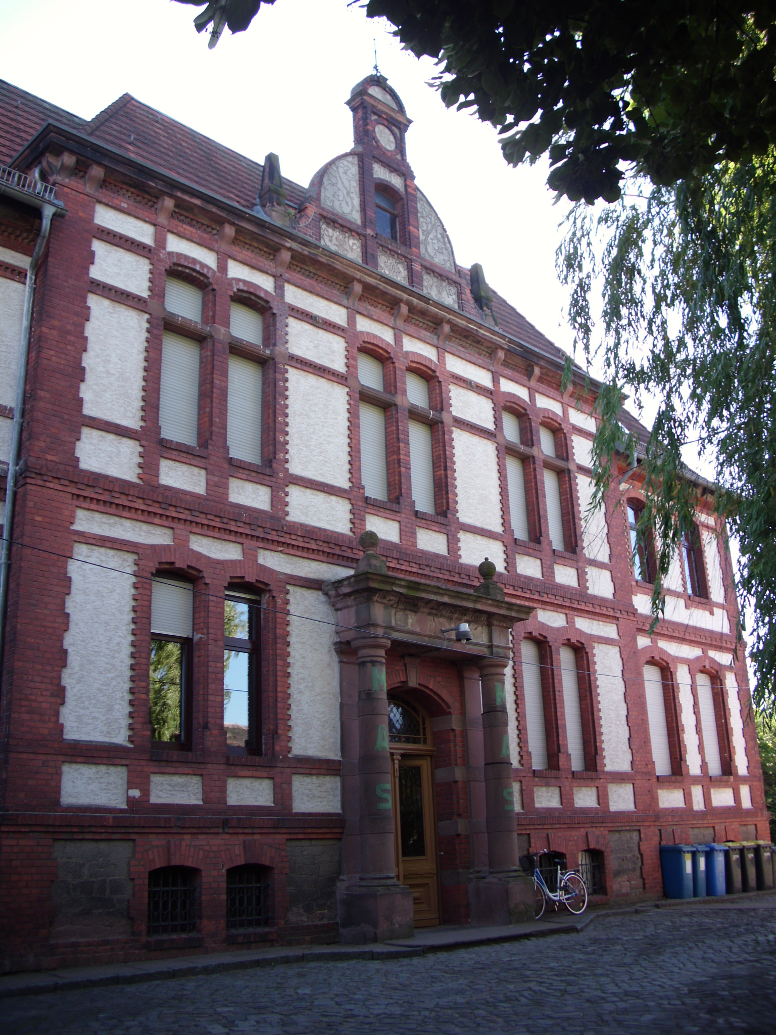 Gemeindehaus Gutenswegen von der Ostseite aus, mit dem Eingangsportal. In dem Objekt befindet sich die Kita 'Villa KunterBunt', der Sitz des Bürgermeisters und ein großer Mietraum für Veranstaltungen.